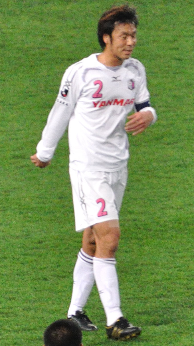 0-0 Kenji Haneda